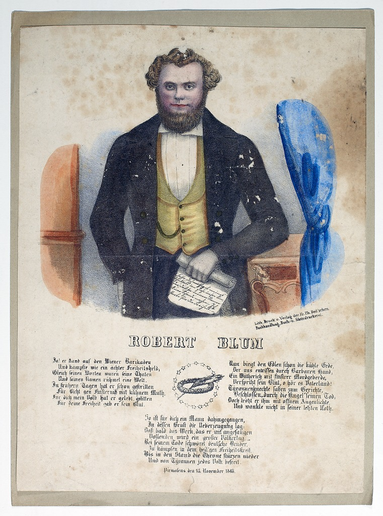 Portrait Robert Blum und Gedicht, datiert Pirmasens 15. November 1848